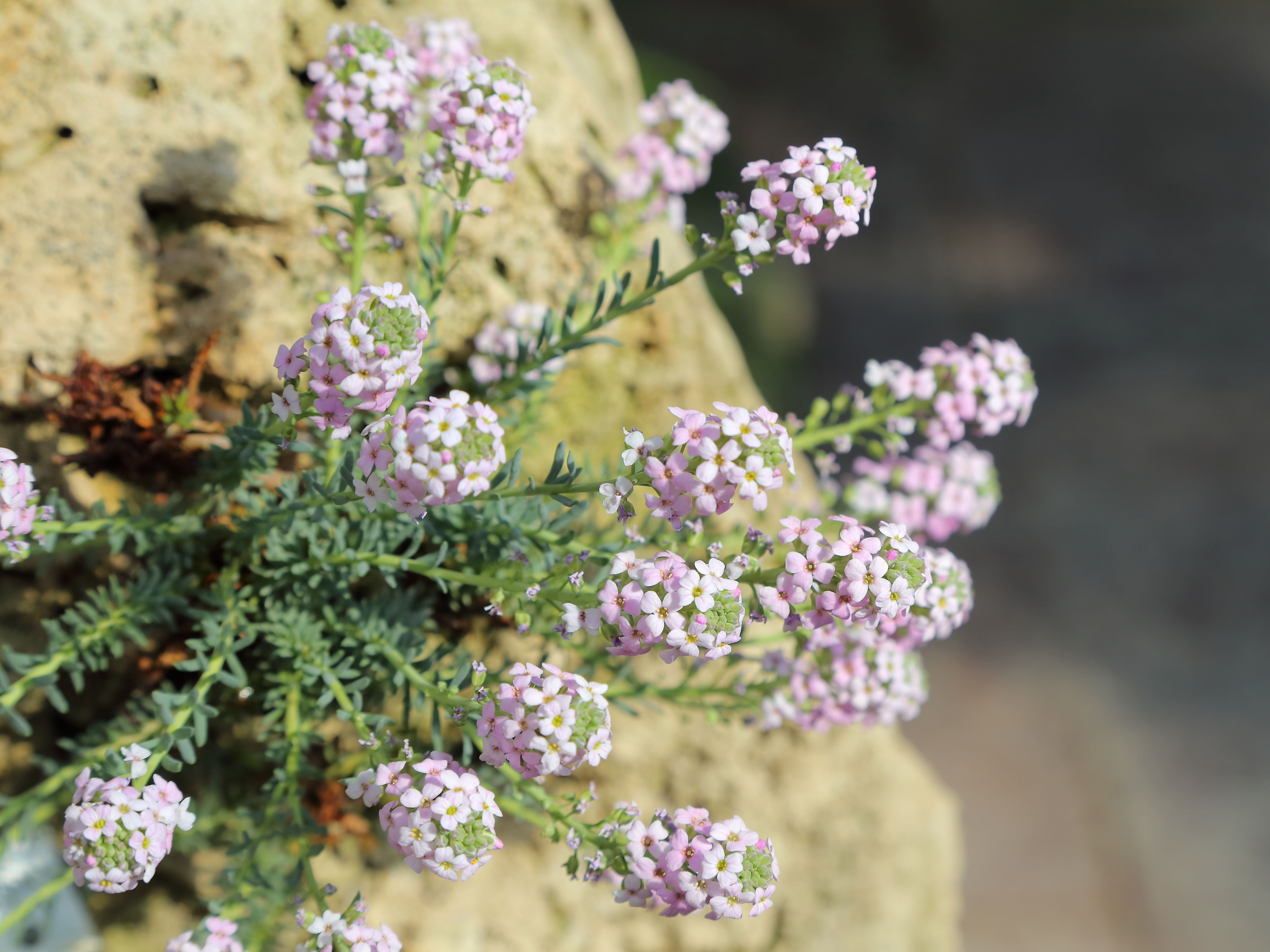 Aethionema capitatum identifierad med hjälp av skylt i Göteborgs botaniska trädgård.